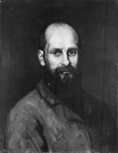 Auguste Danse (1829-1929)